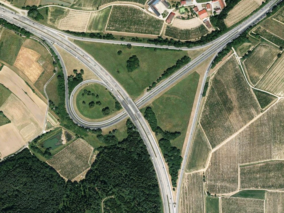 Luftaufnahme der Bayerischen Vermessungsverwaltung: Autobahndreieck Holledau der BAB 9 und BAB 93 in Wolnzach, Bayern.